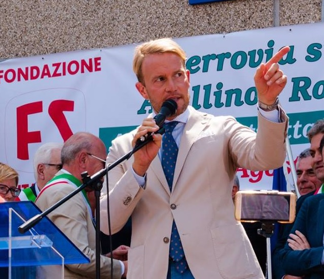 Lioni, agosto 2017: inaugurazione del ripristino dell'esercizio ferroviario turistico sulla Avellino - Rocchetta.